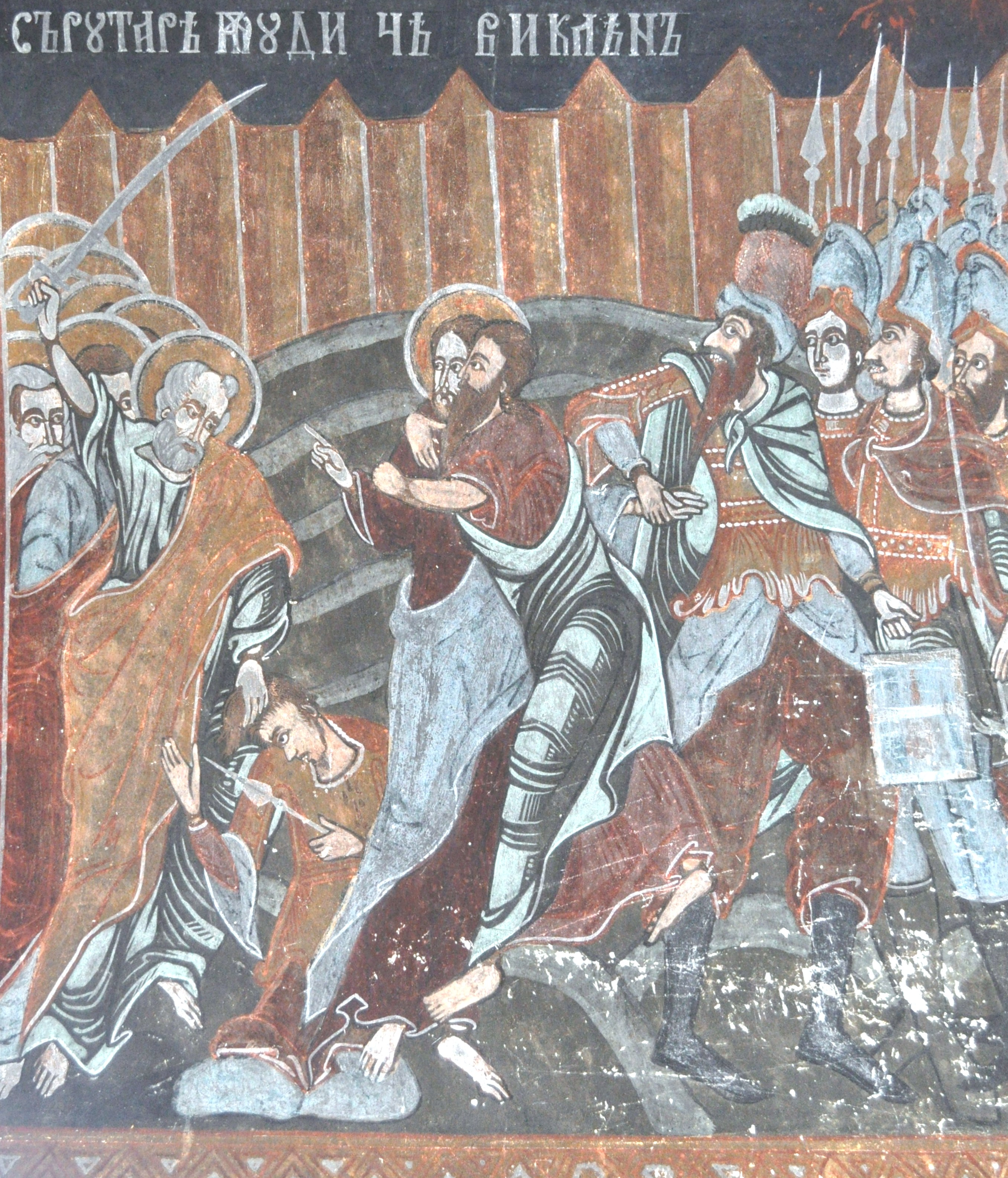 Biserica „Cuvioasa Paraschiva” din Țichindeal, județul Sibiu